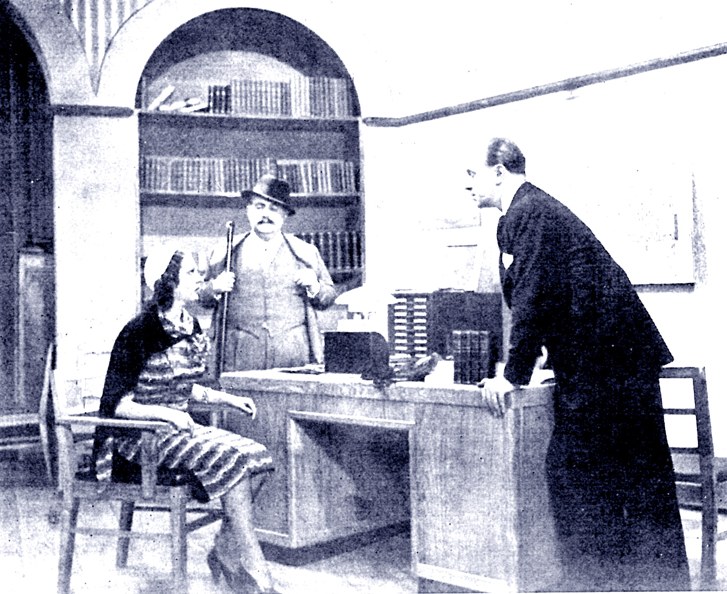 Carla Candiani, Guglielmo Bernabò e Franco Coop ne "L'albergo degli assenti" (Matarazzo, 1939)